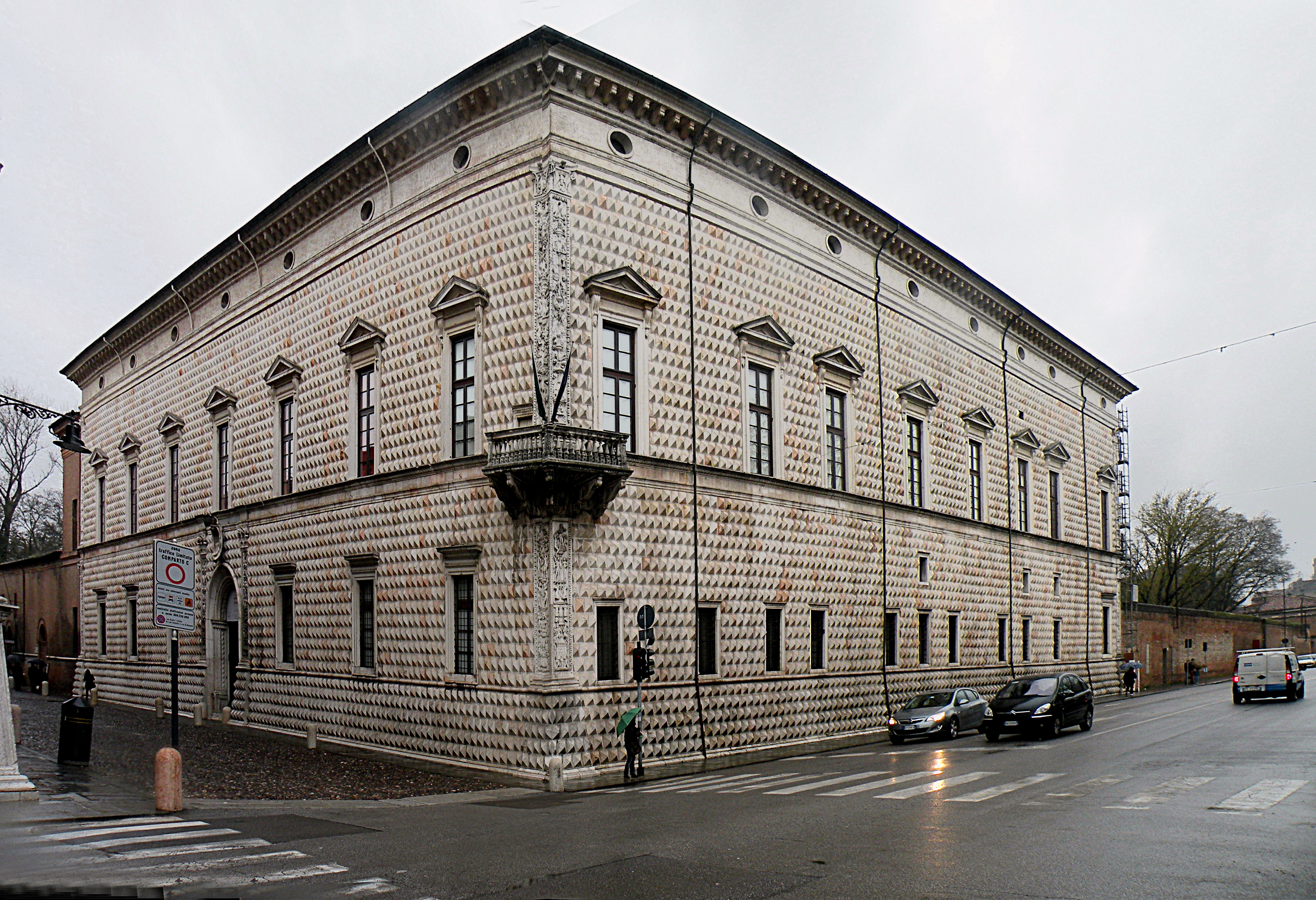 Алмазный дворец в Ферраре